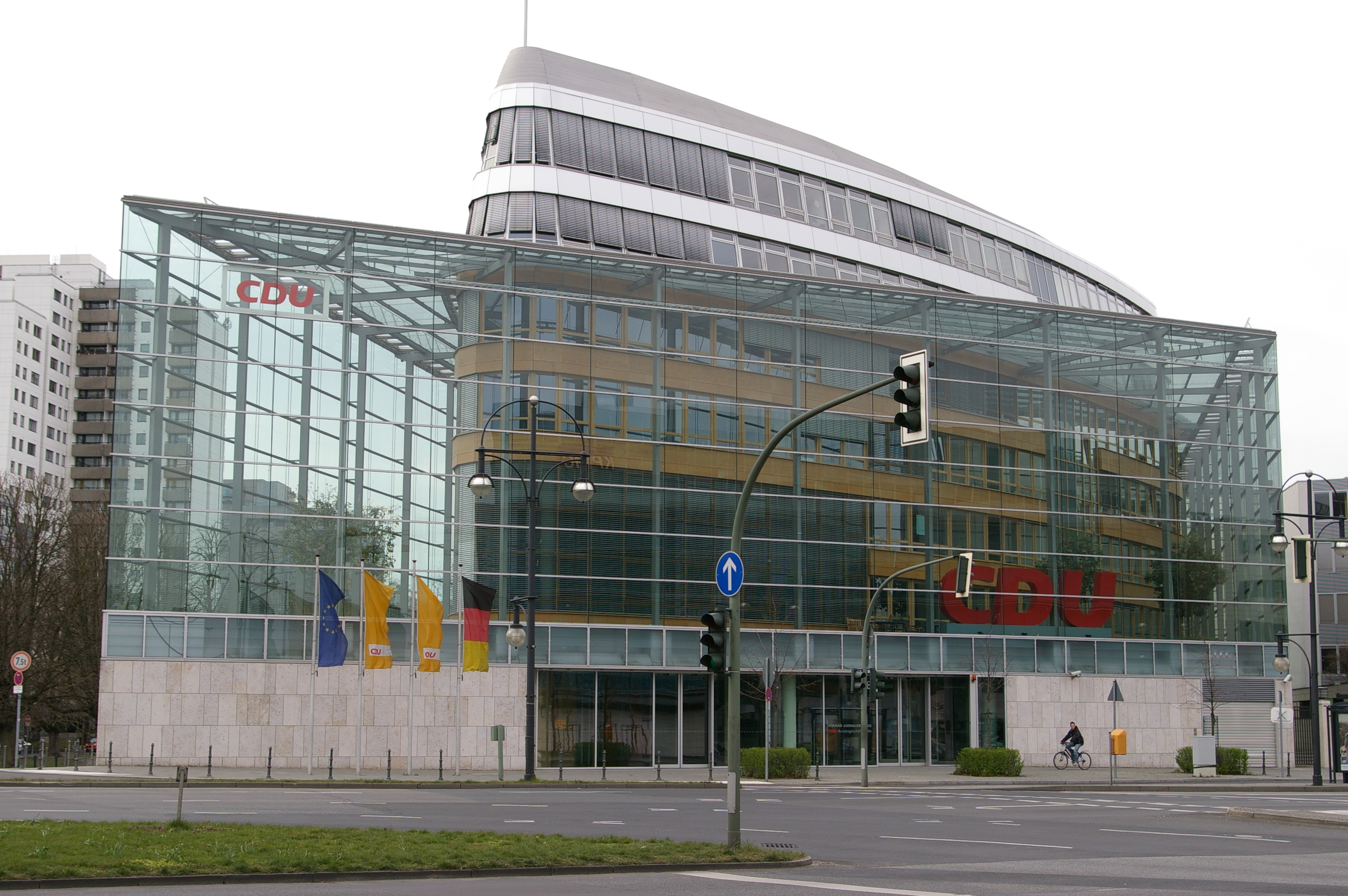 siège de la CDU, Berlin